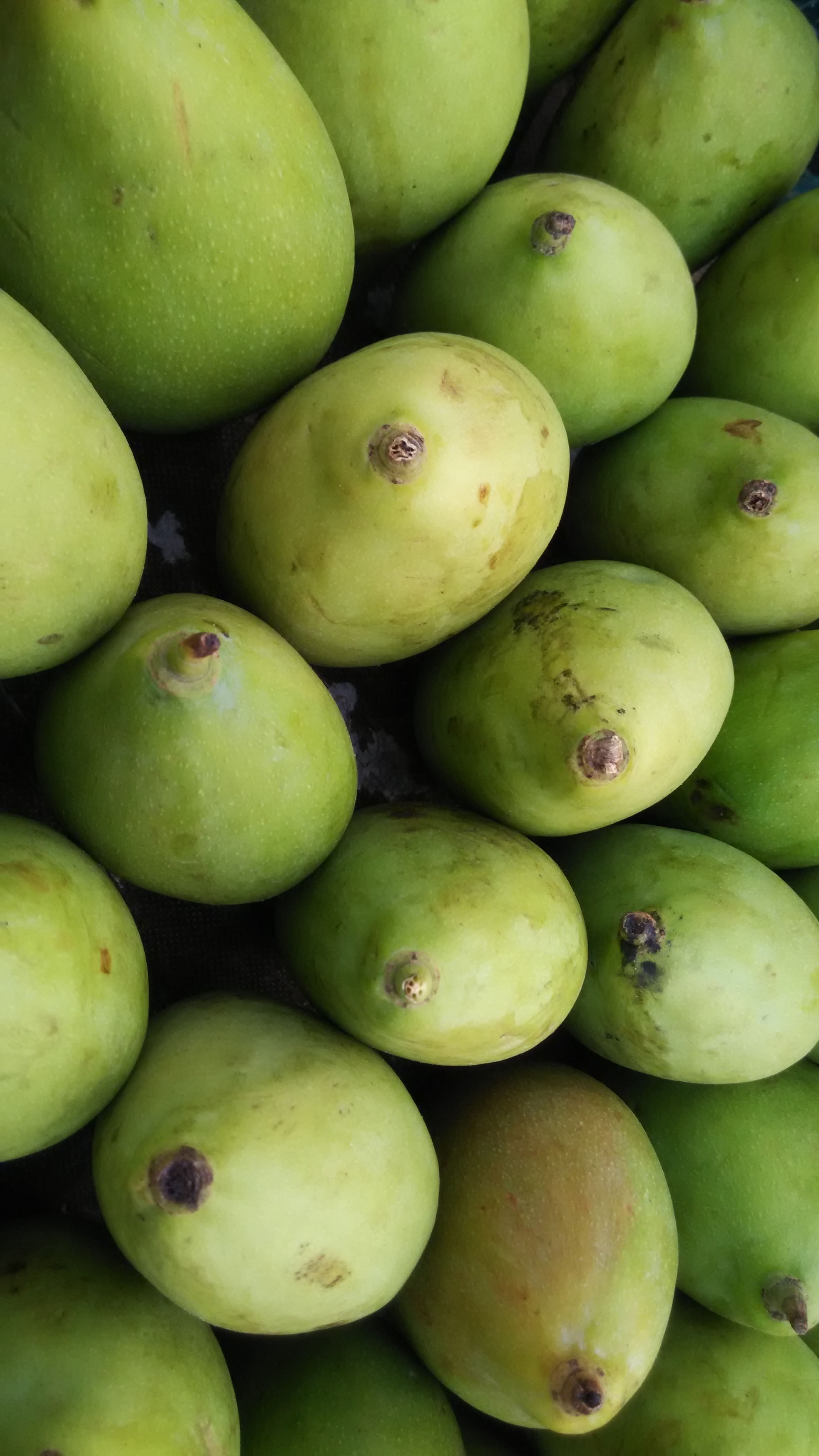 மாங்காய்